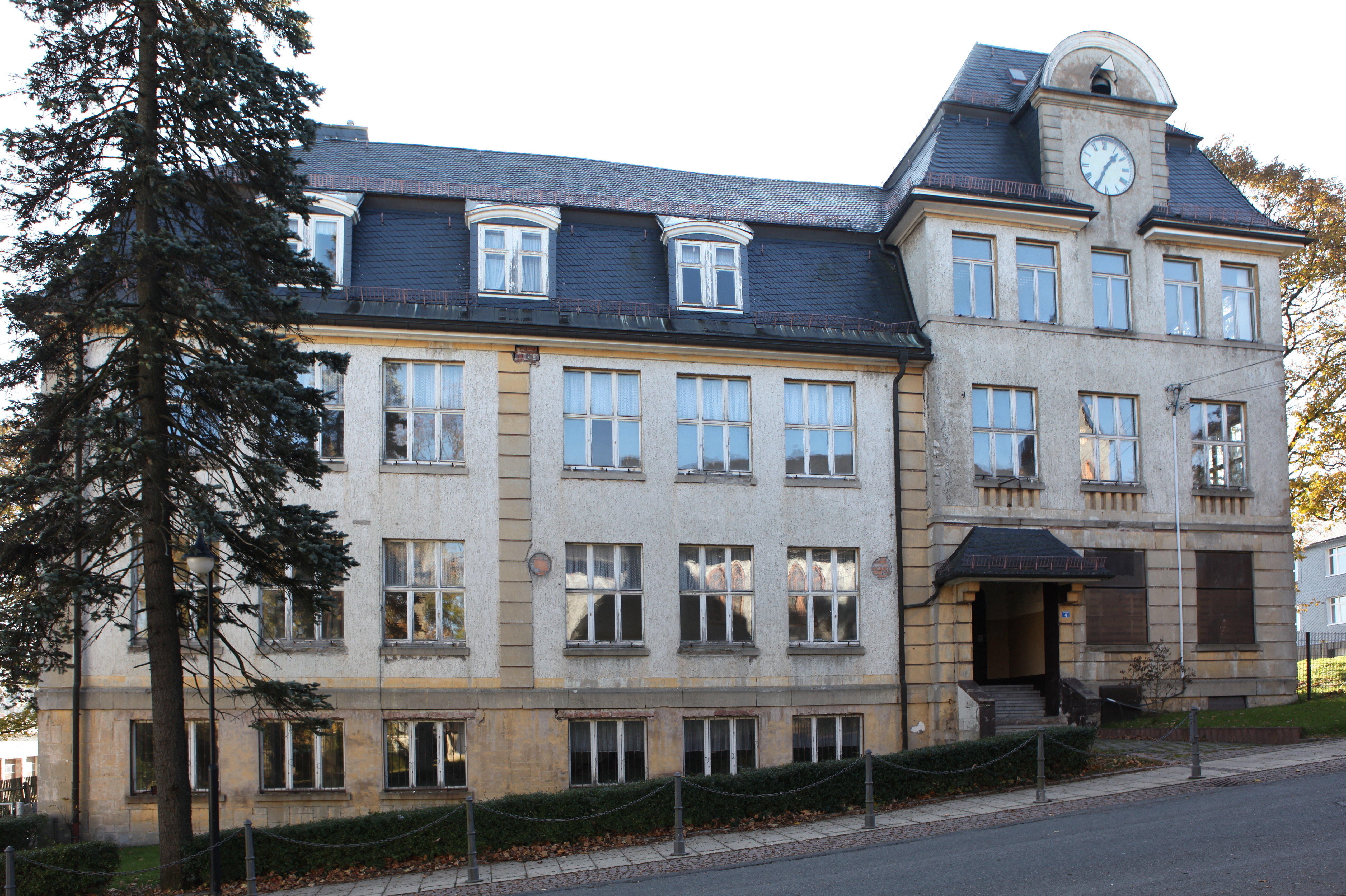 Schule, 1910/11 von P. Schade, Neuhaus am Rennweg, Kirchweg 4